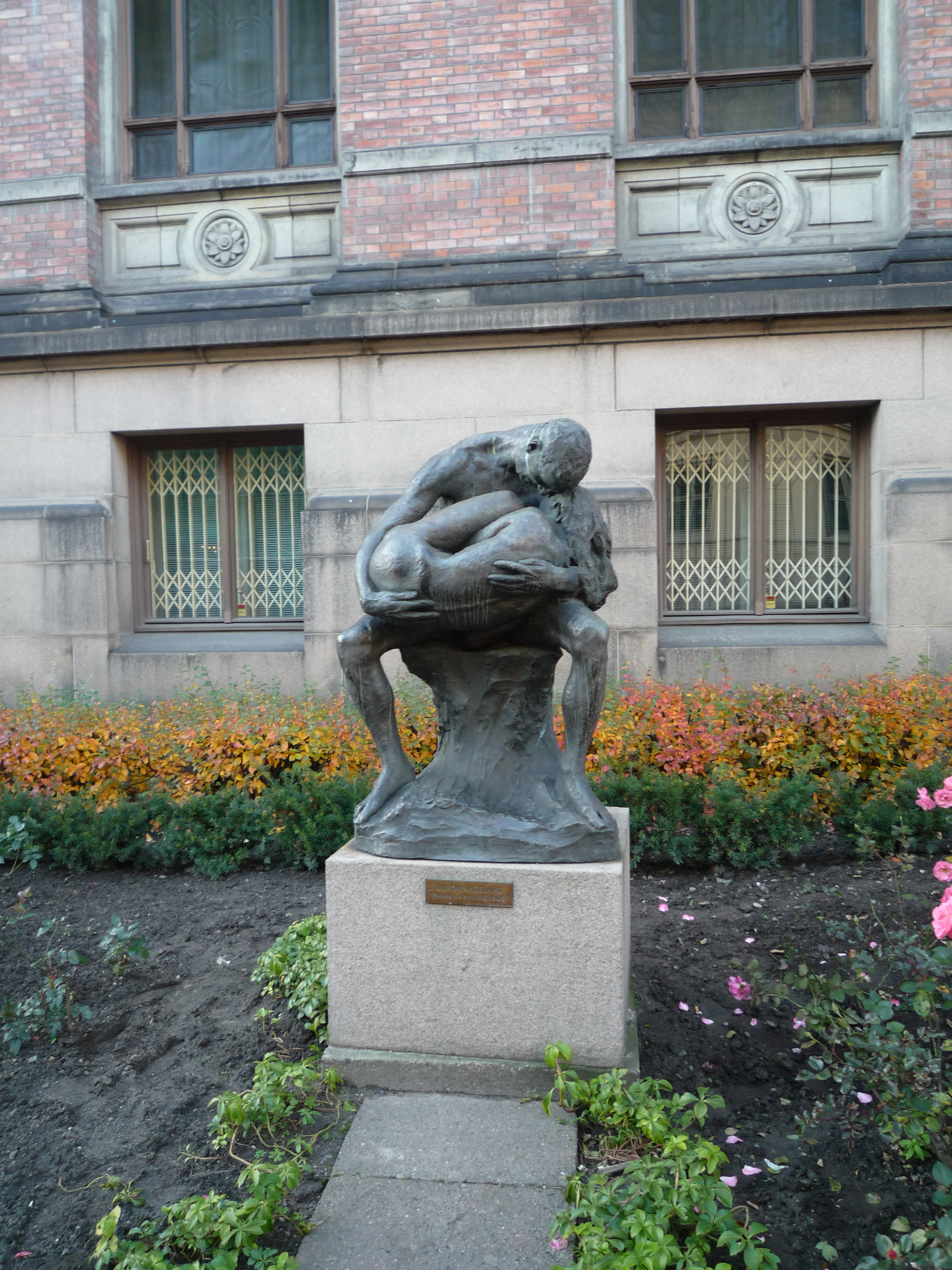 Памятник Густаву Вигеланду